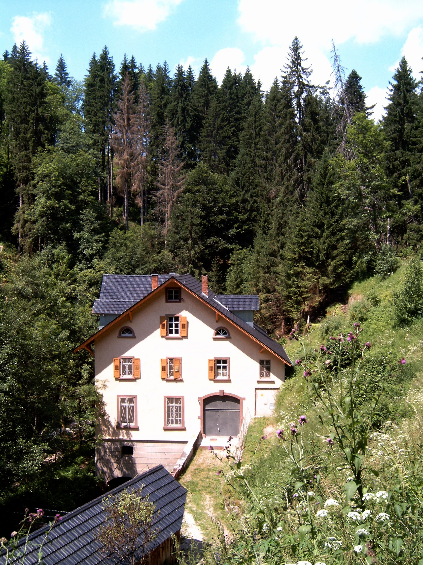 Turbinenhaus des Flusskraftwerkes Stallegg